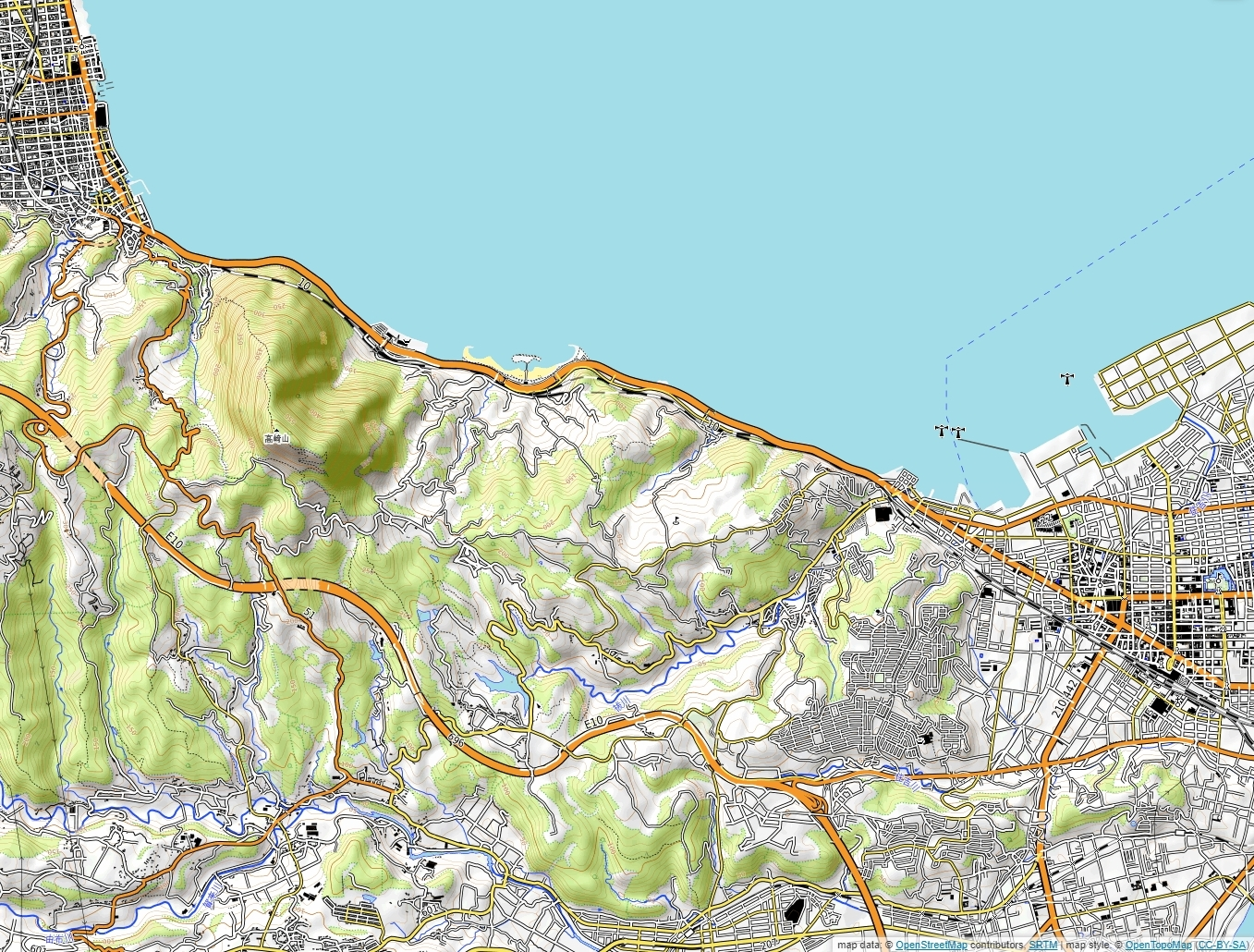 別府大分地形図